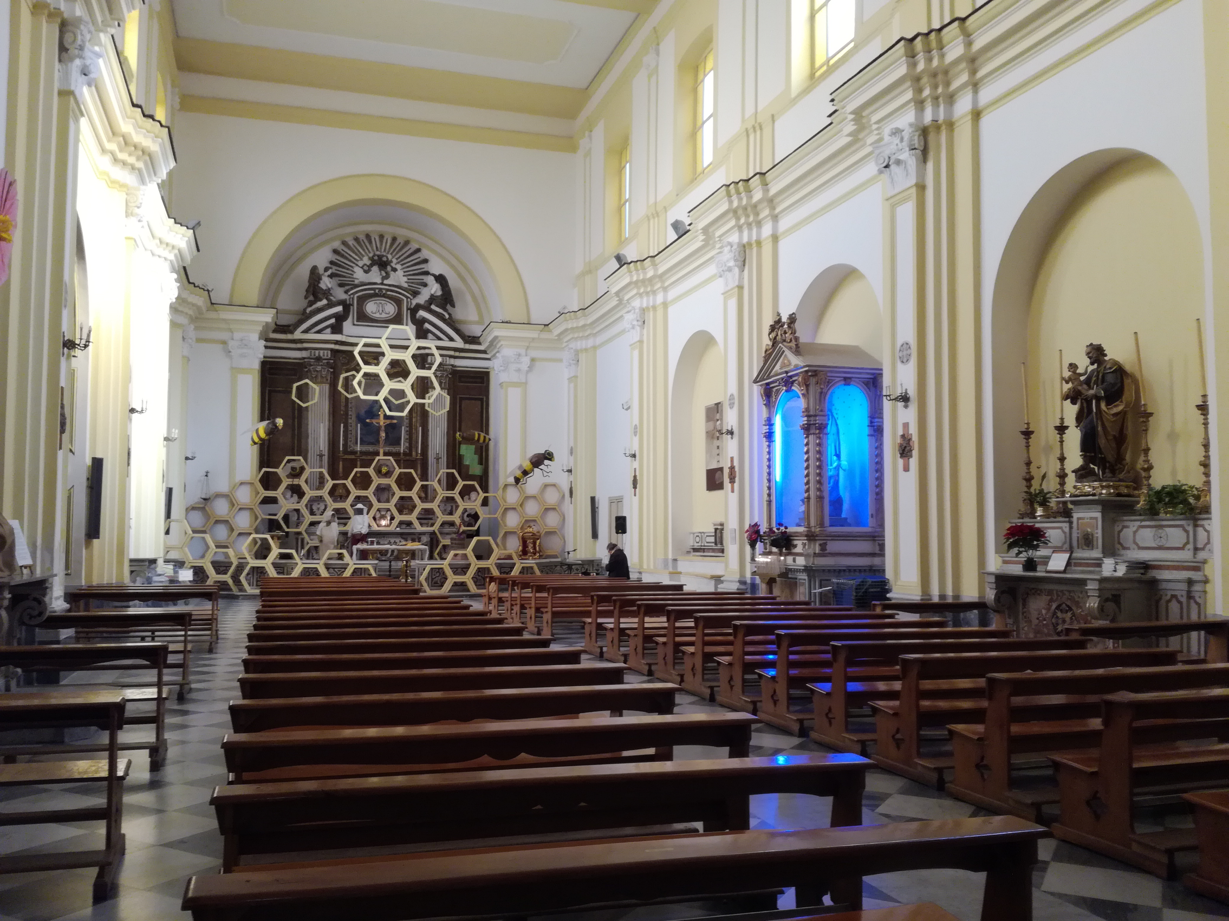 Maria dei Vergini